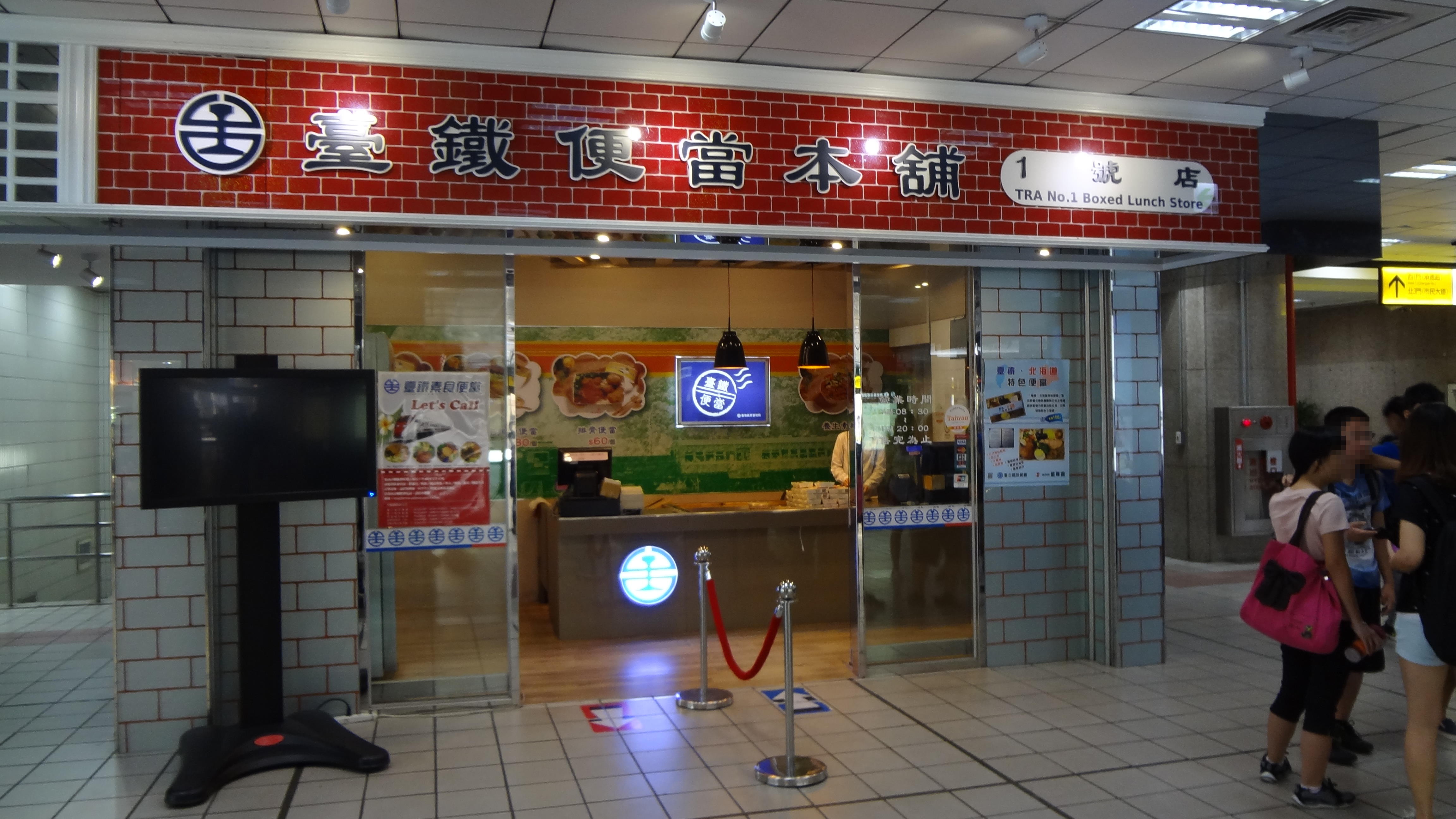 臺鐵便當本舖1號店，位於臺北車站1樓。